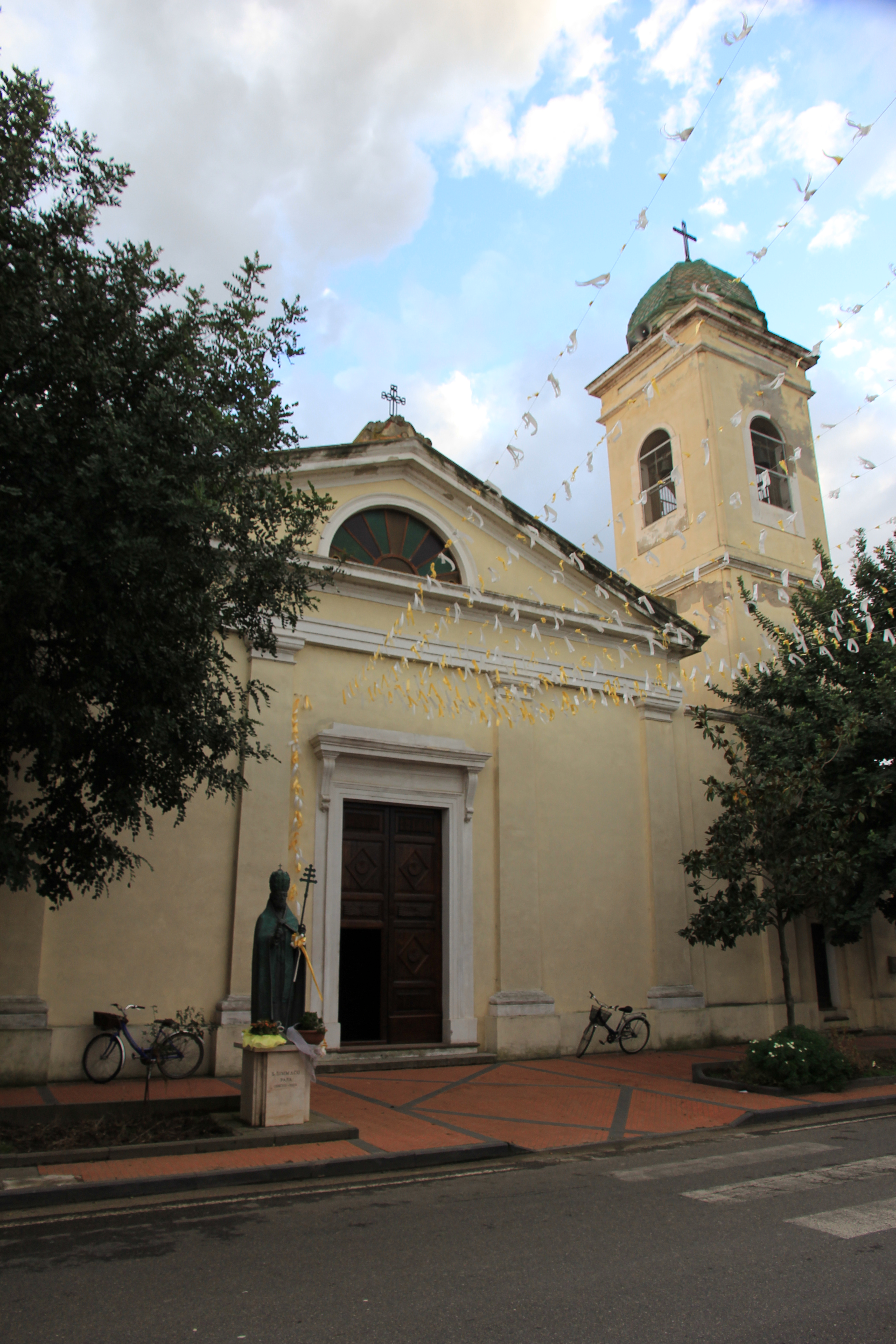 Simaxis - Chiesa di San Simaco papa